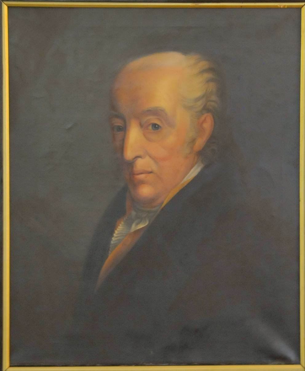 Porträt von Ernst Friedich Arnoldi, dem Vater von Ernst-Wilhelm Arnoldi